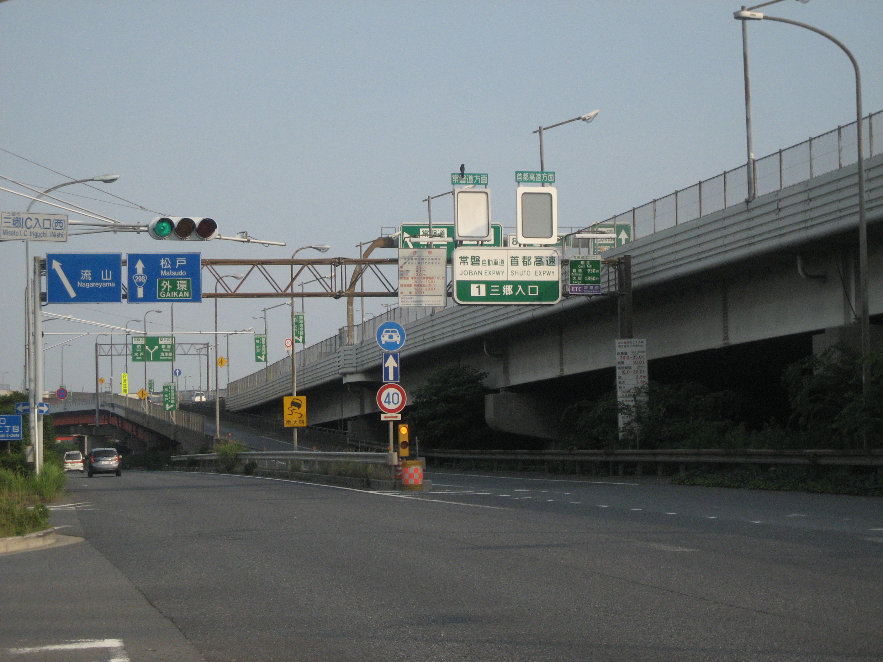 三郷インター入口（国道298号線松戸方面側）歩道より撮影